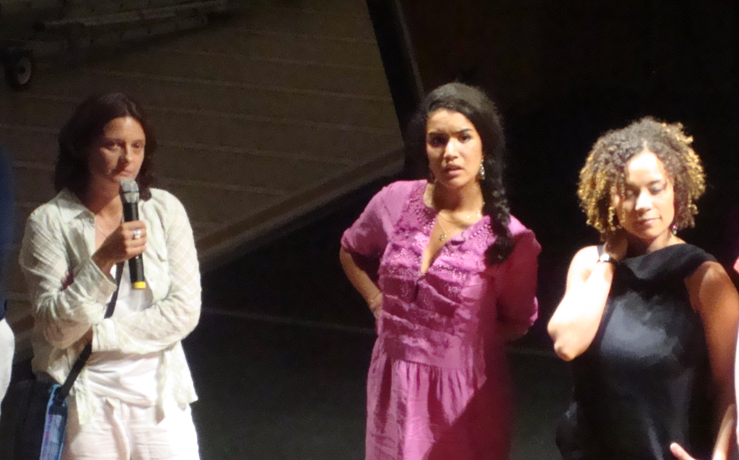 Julia Cordonnier, réalisatrice, sabrina Ouazani, actrice et Olivia Barreau, actrice